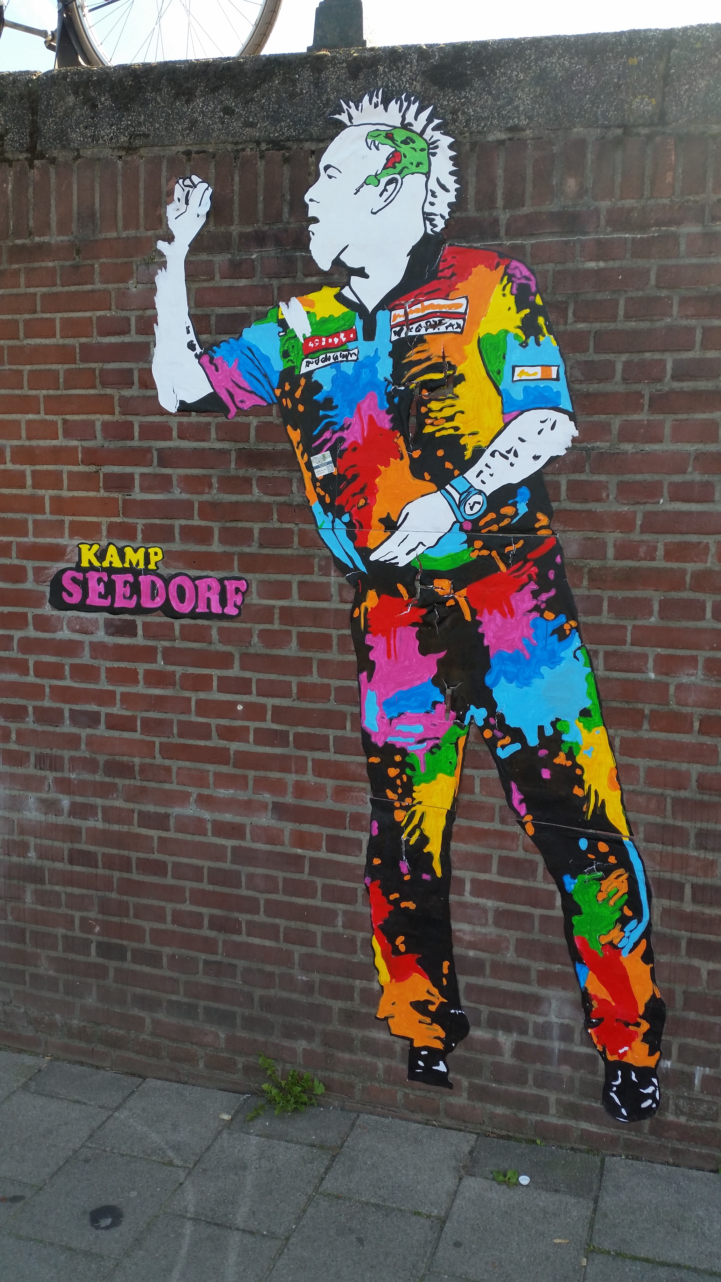 Kamp Seedorfs portret van Peter Wright op een kademuur van Brug 58, Haringpakkersbrug